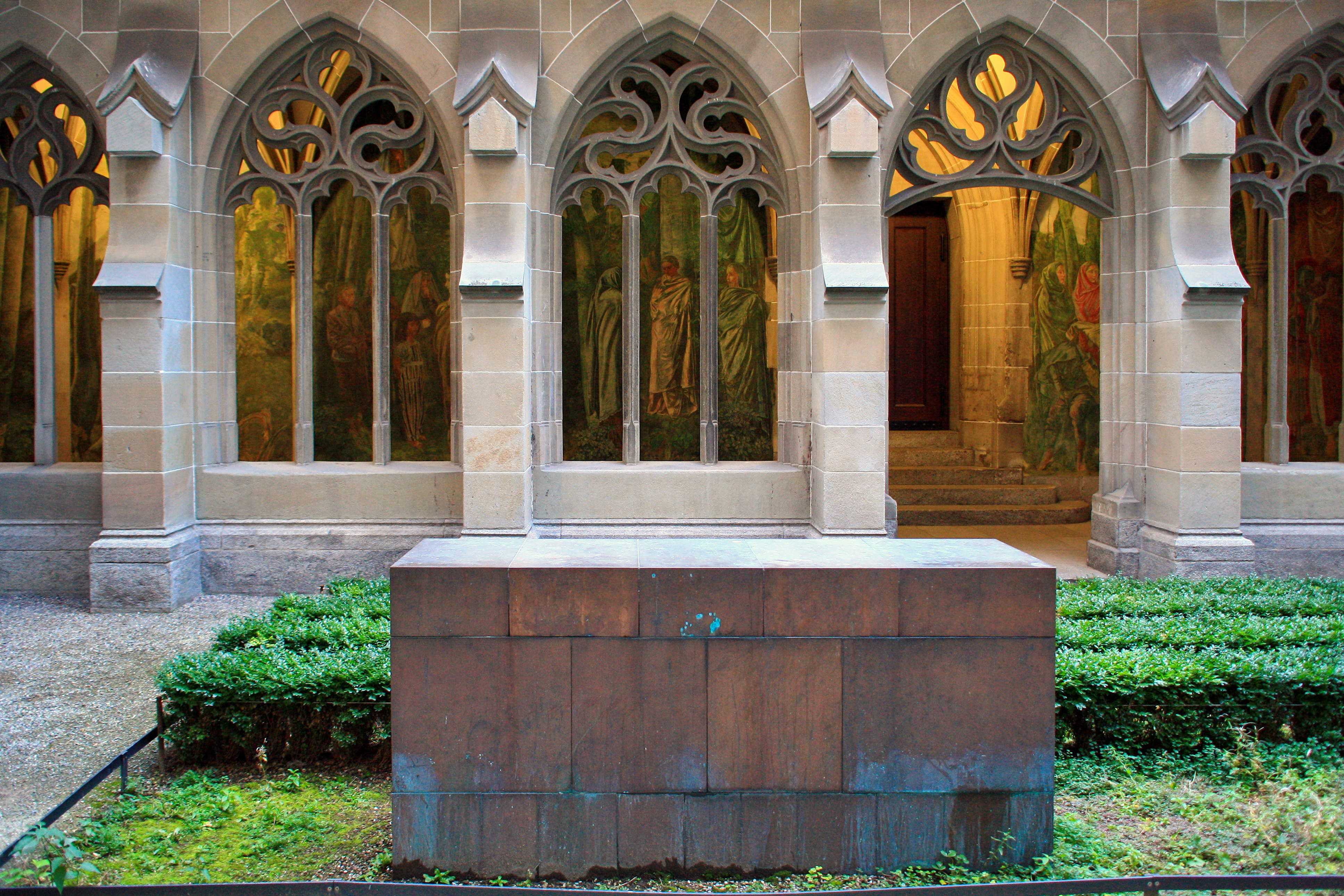 Katharina von Zimmern (1478-1547) memorial in the Fraumünster Kreuzgang in Zürich (Switzerland) "Die Stadt vor Unruhe und Umgemach bewahren und tun, was Zürich lieb und dienlich ist". 1524. Katharina von Zimmern, Zürichs letzte Äbtissin, zur Übergabe der Abtei Fraumünster an die Stadt.